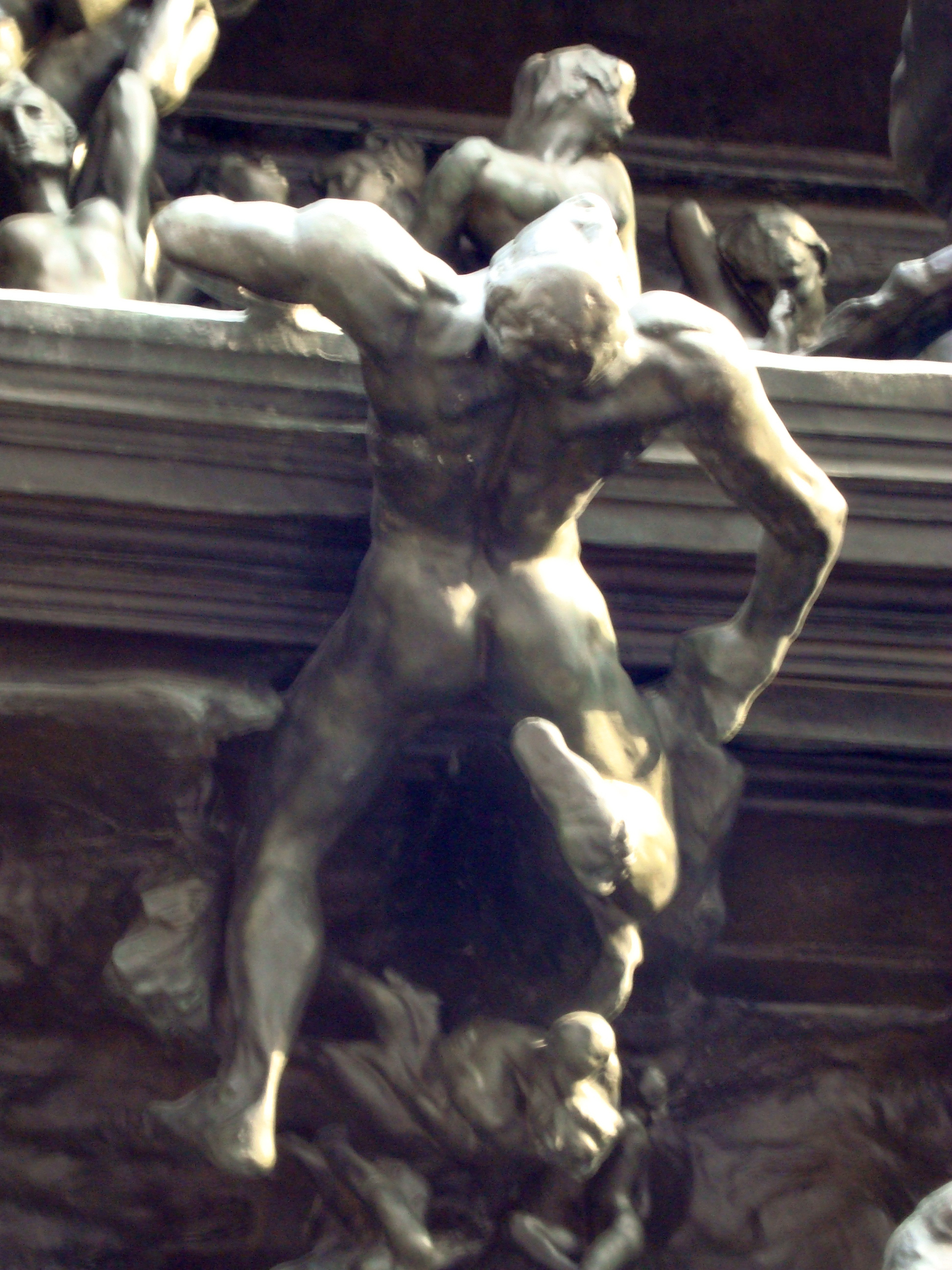 Détail de la Porte de l'enfer du Musée Rodin à Paris